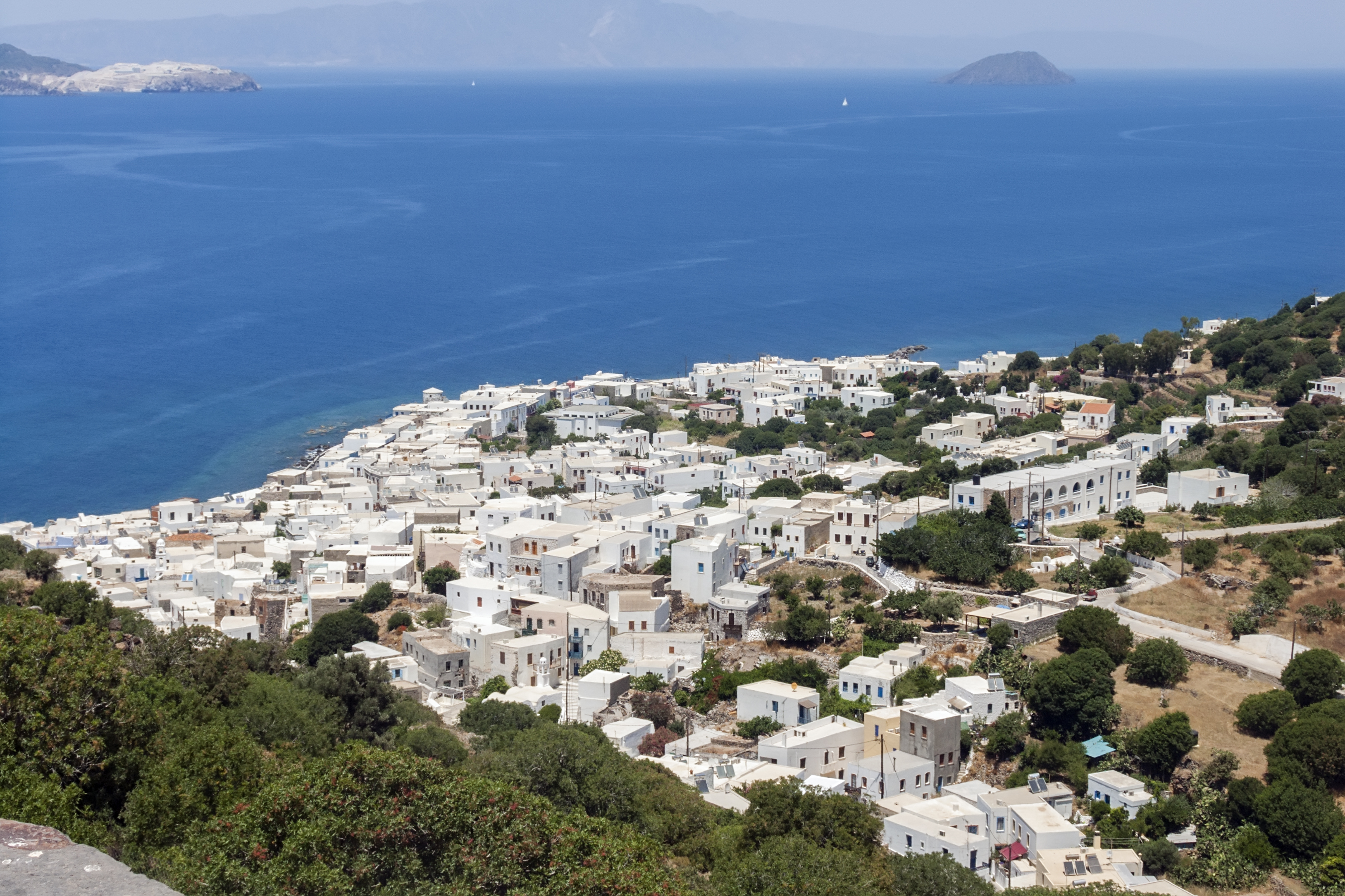 Мандраки. Вид из древней крепости.